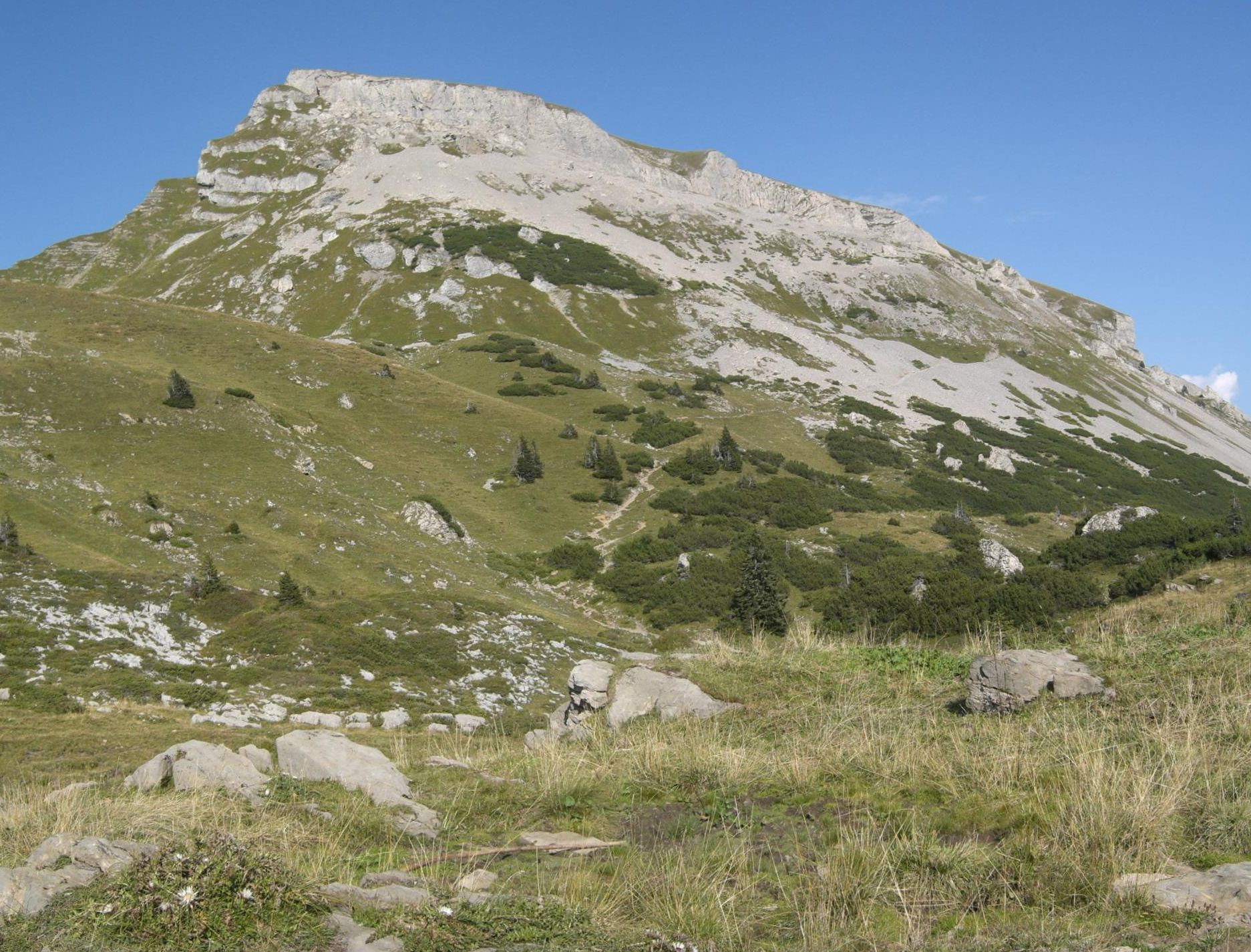 selbst aufgenommen